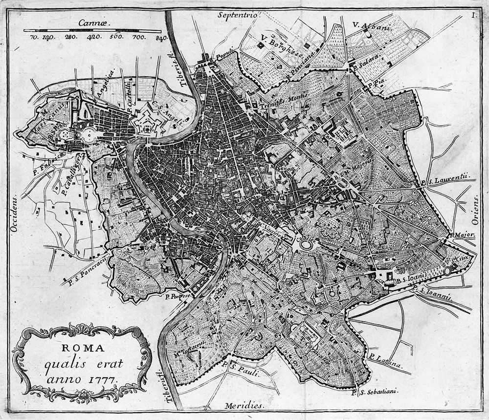 Plan de Rome en 1777 - graveur inconnu